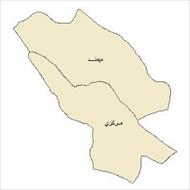 meymadnmap